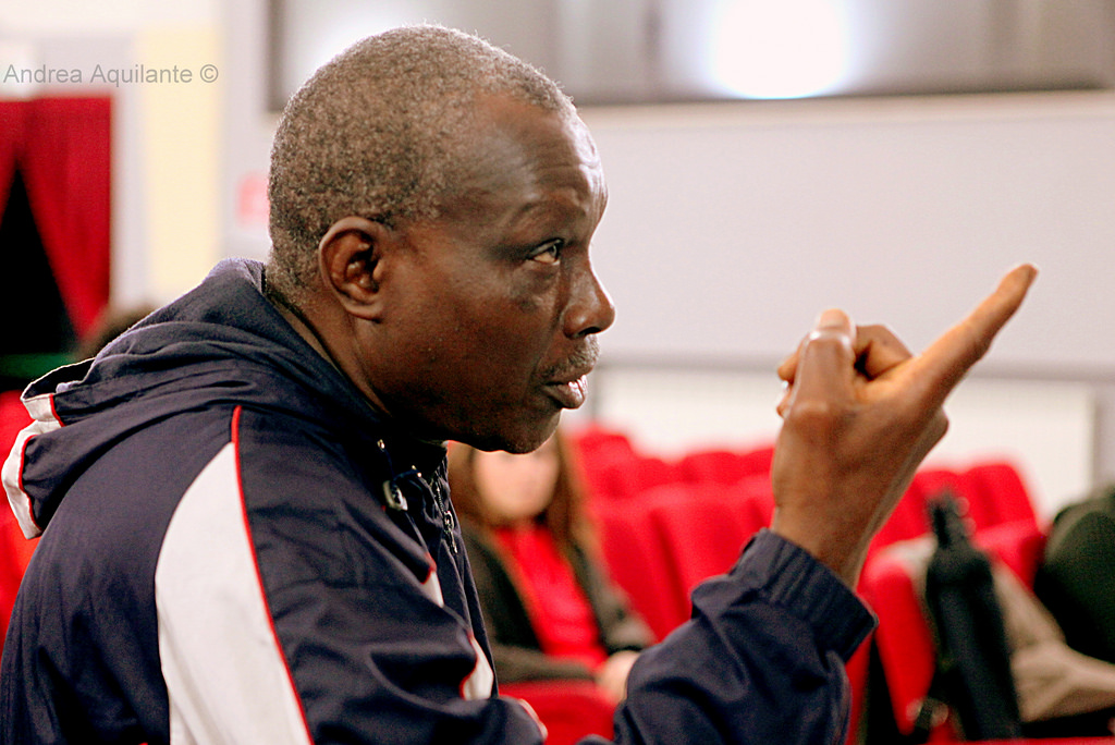 Mamadou Dioume, attore teatrale, regista teatrale, pedagogo.